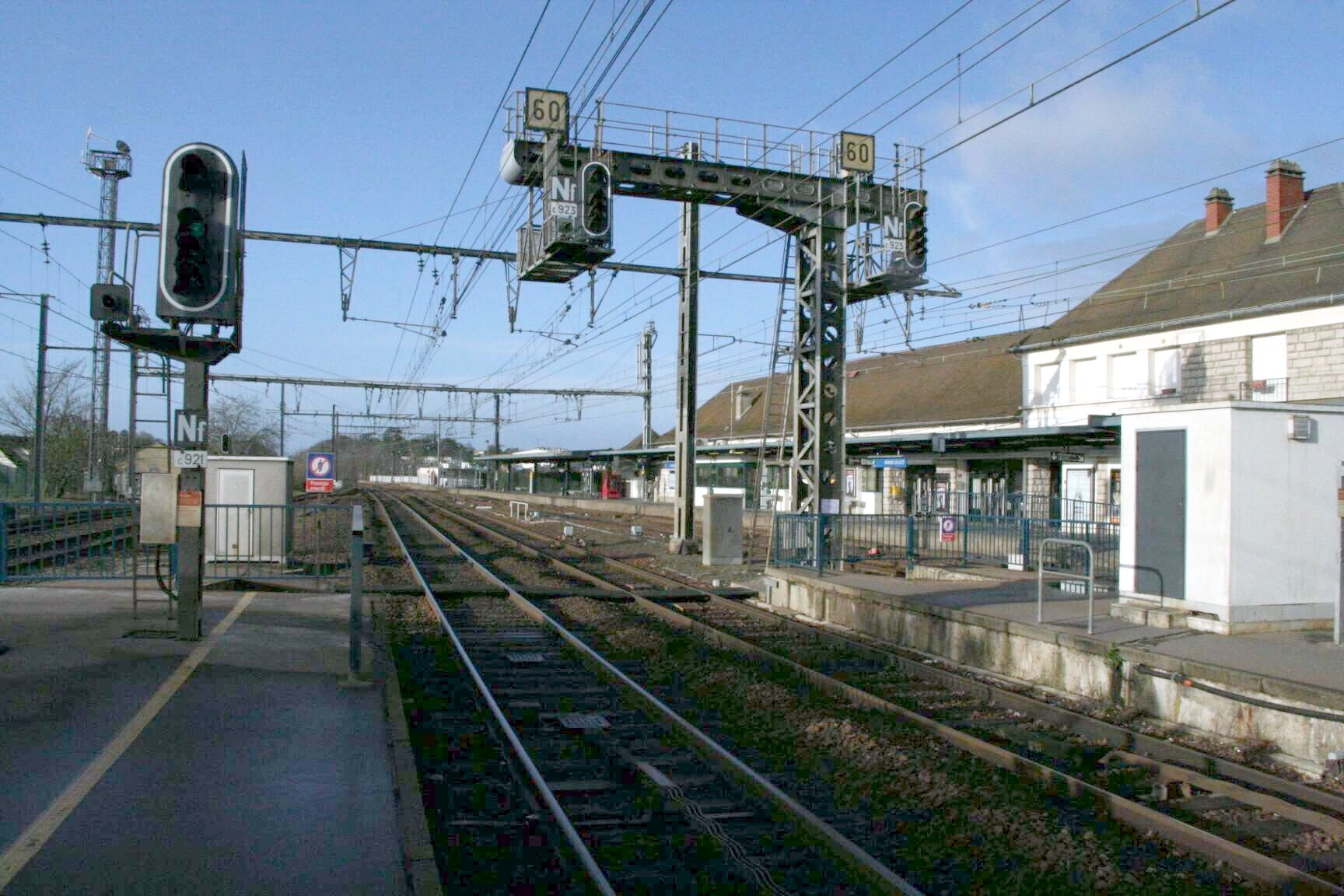 Gare de Rambouillet - Yvelines (France), les voies vers le sud